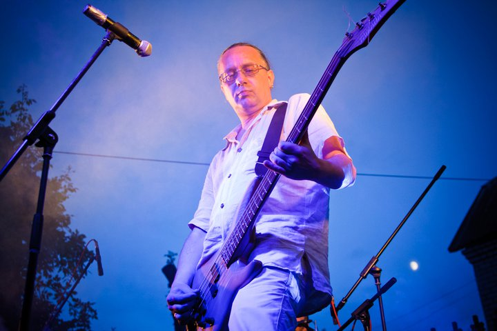 Юрась Левков. Концерт N.R.M. в городе Горки, 11 июня 2011 года